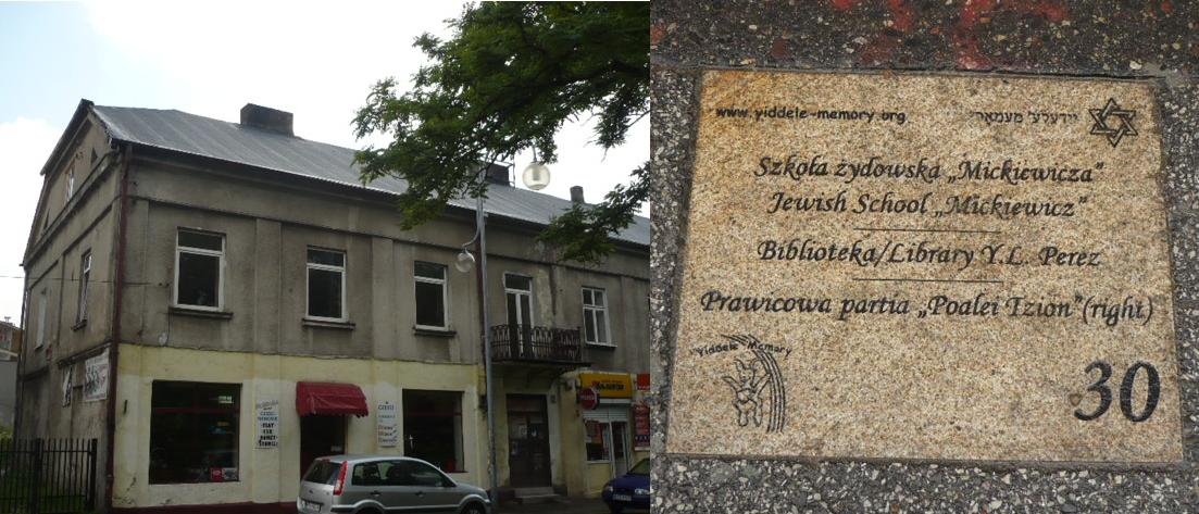 Radomsko. Otwarte Muzeum Żydowskie 30